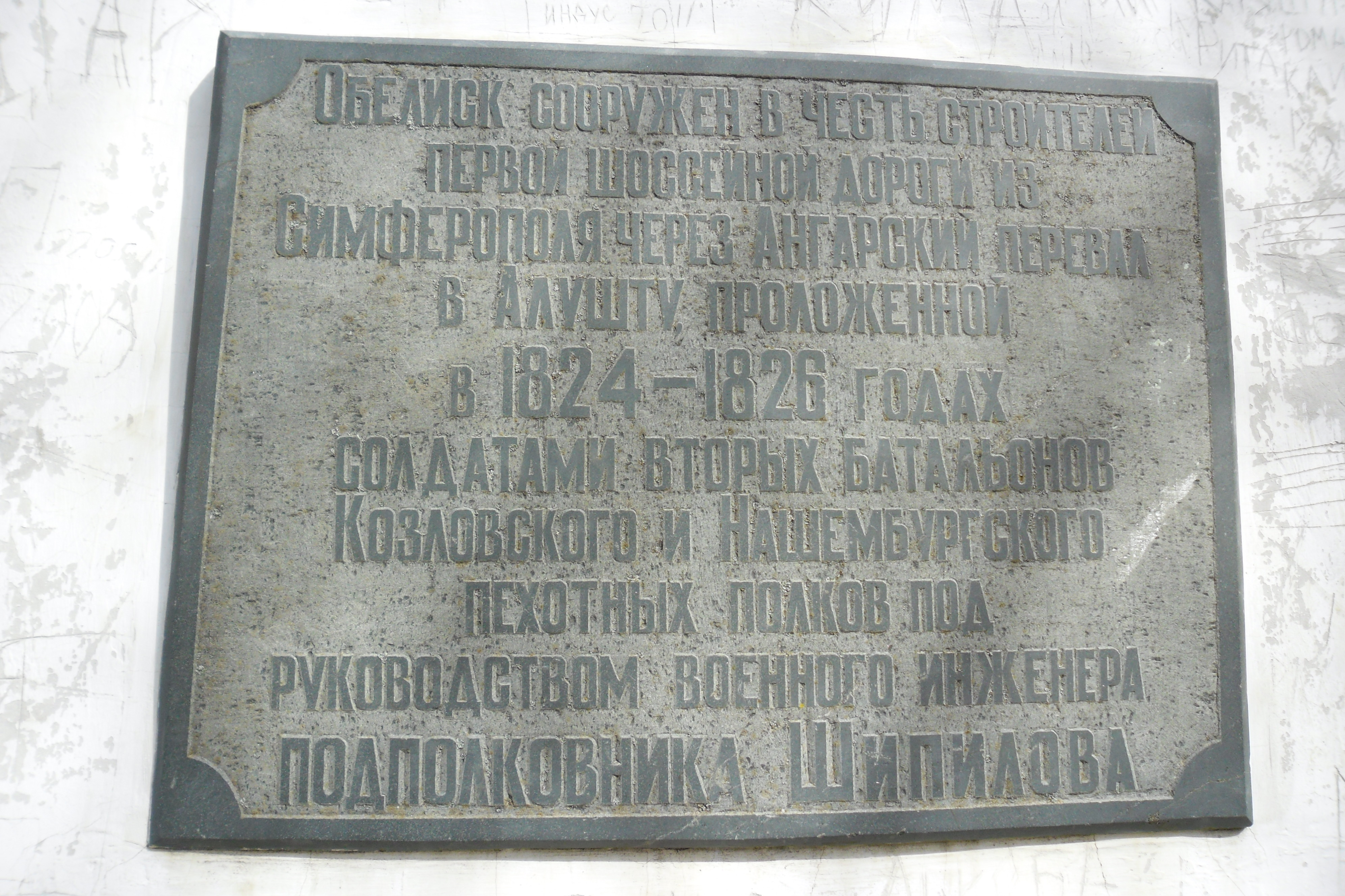 Фото